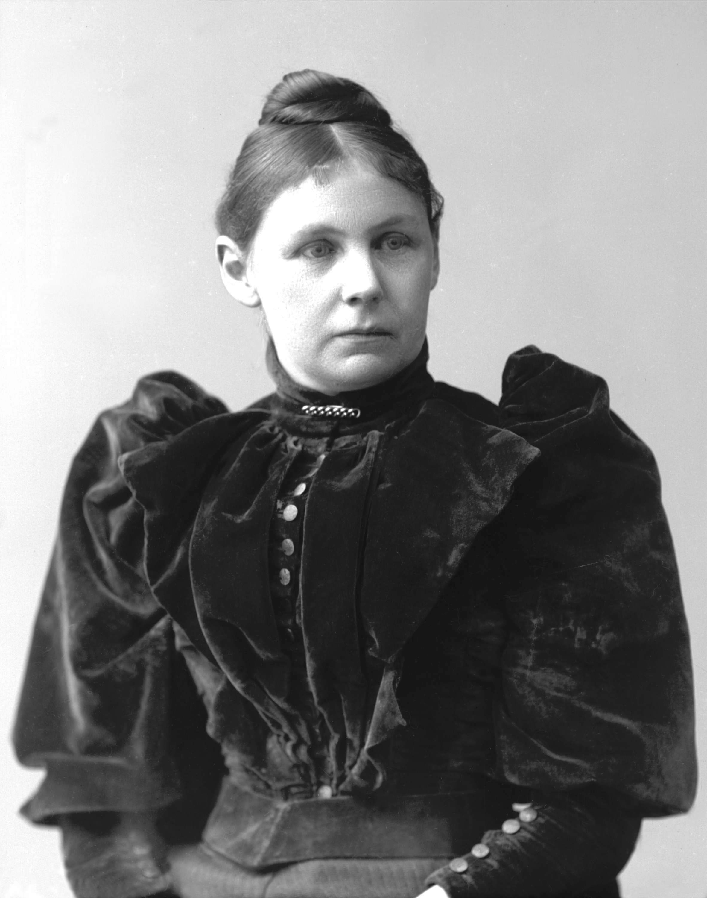 Portrett av Frida Hansen ca 1896. Fotograf: Borgen, Gustav Tilhører: Norsk Folkemuseum